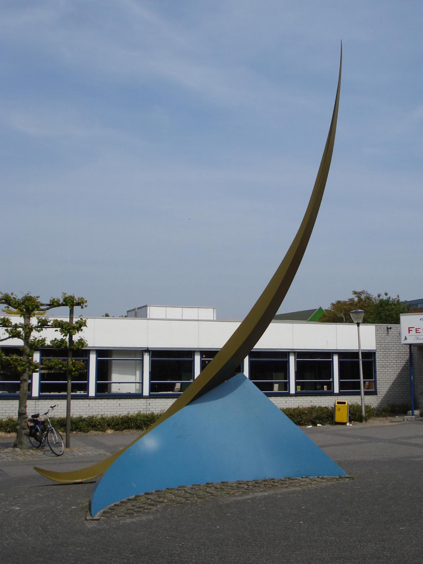 Zwijndrecht, Norderstedtplein. Kunstwerk "Muze achter de dijk" van Theo ten Have. Zwijndrecht/The Netherlands. FOP.